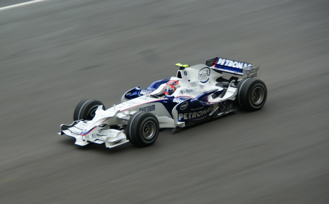 Robert Kubica 2008 Malaysia